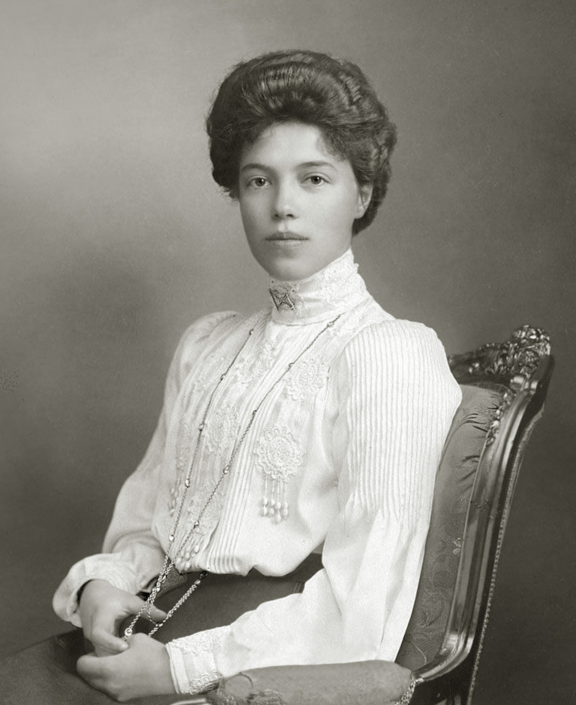 Ольга Александровна